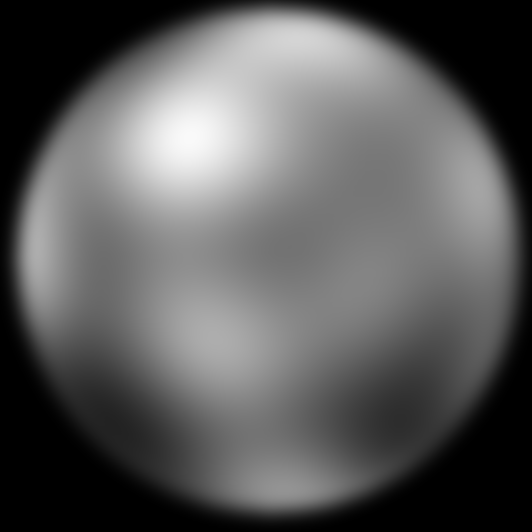 Pluto